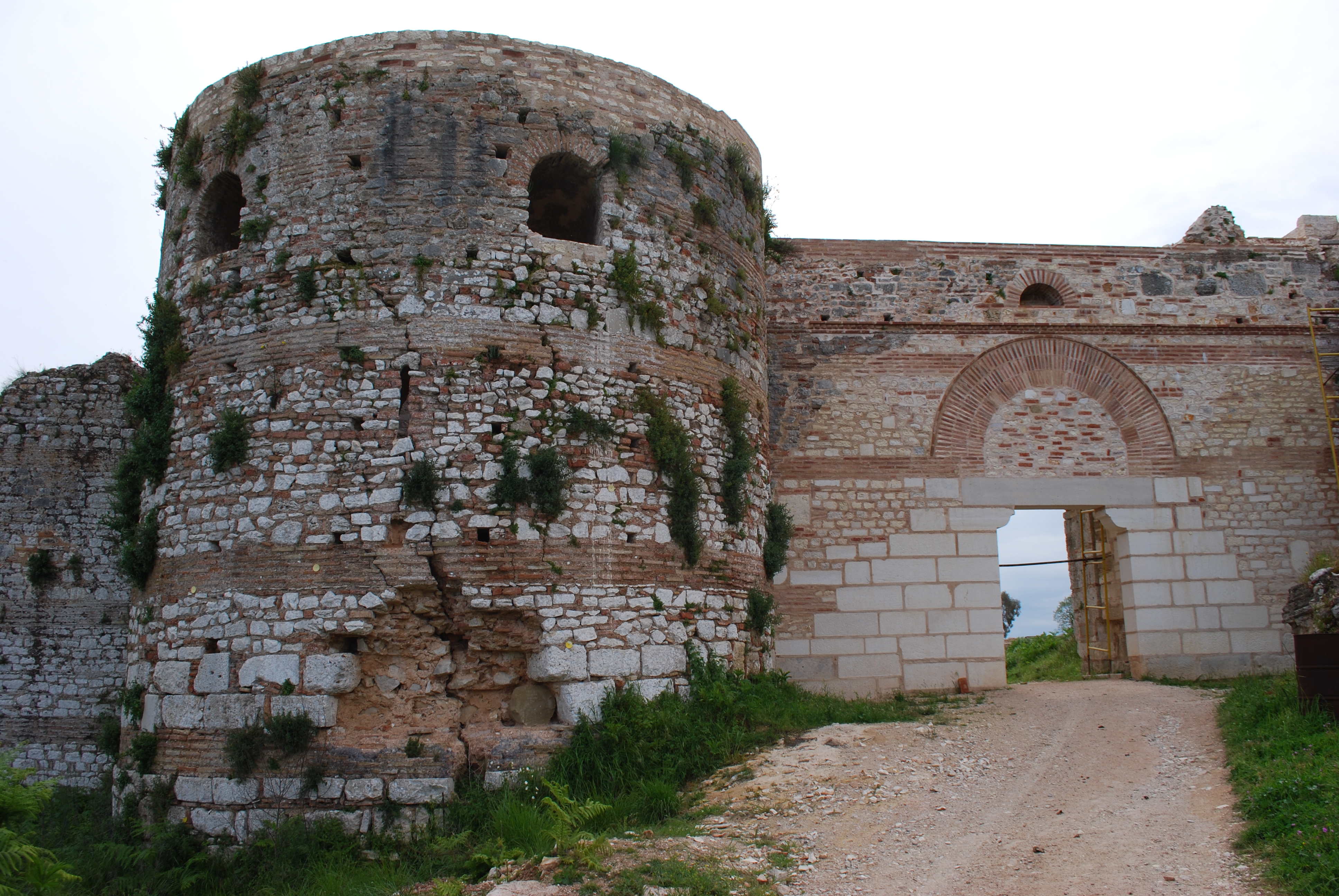 Vue de Nicopolis en Epire.